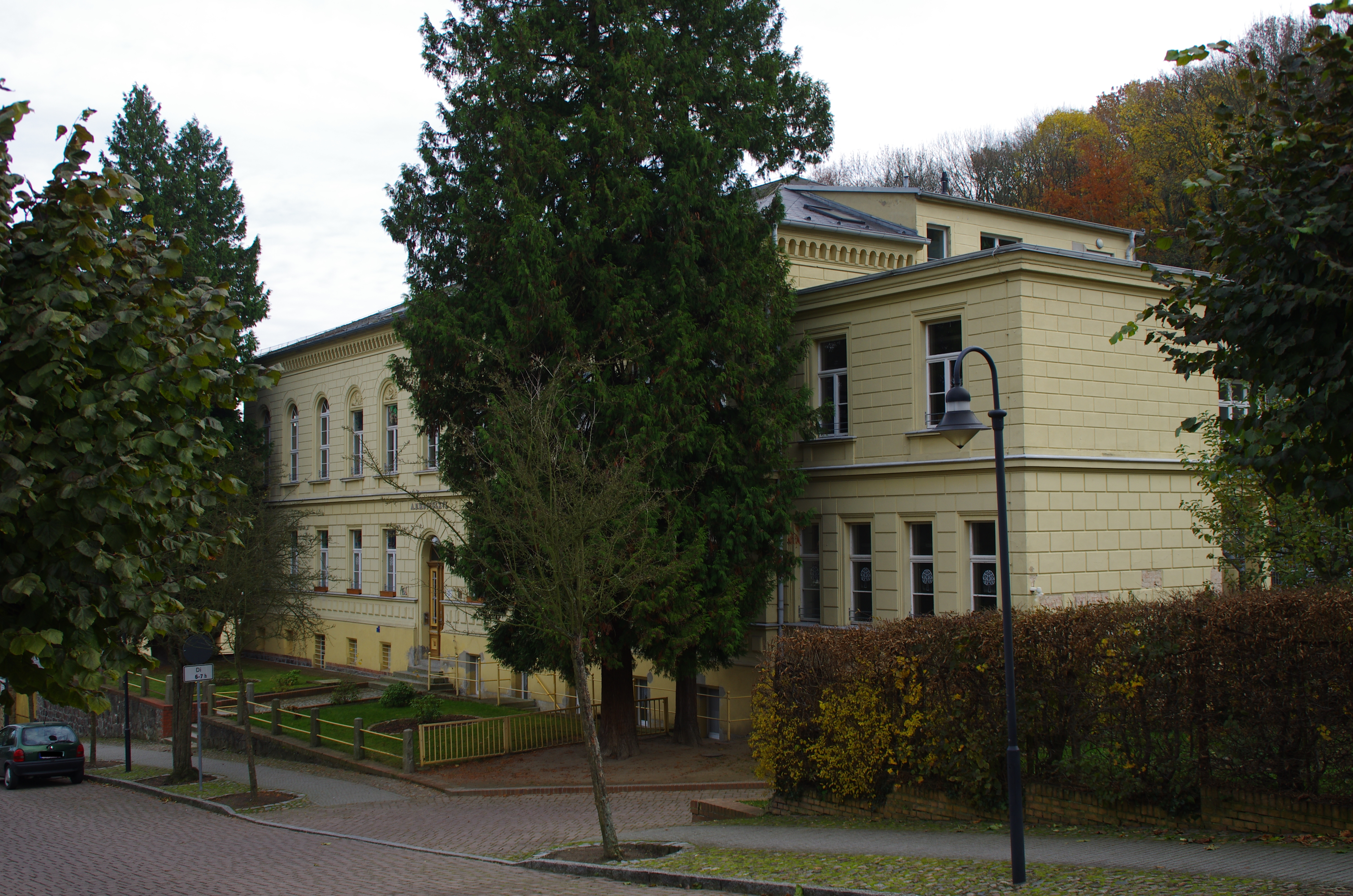 Bad Freienwalde (Oder) in Brandenburg. Das Haus Weinbergstraße 4 steth unter Denkmalschutz.